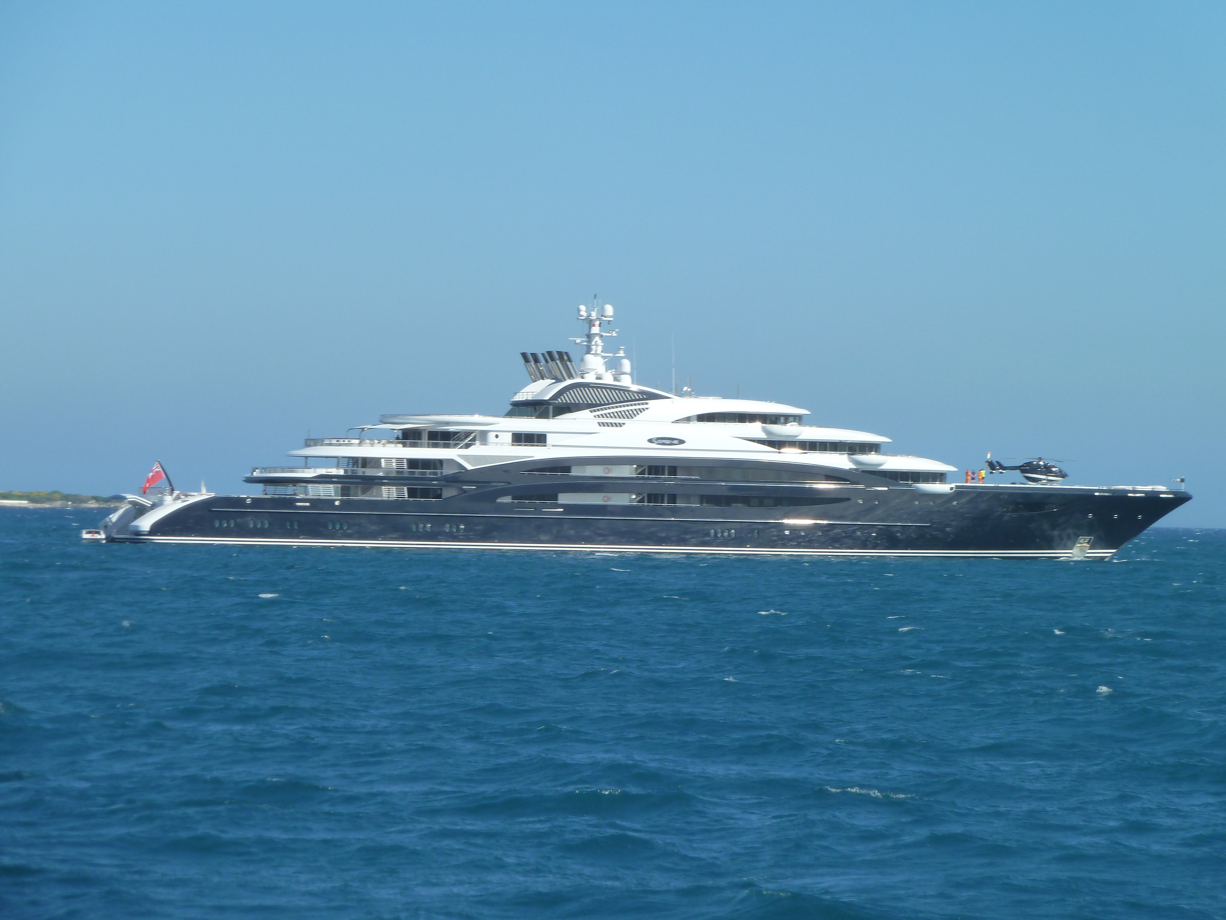 Serene